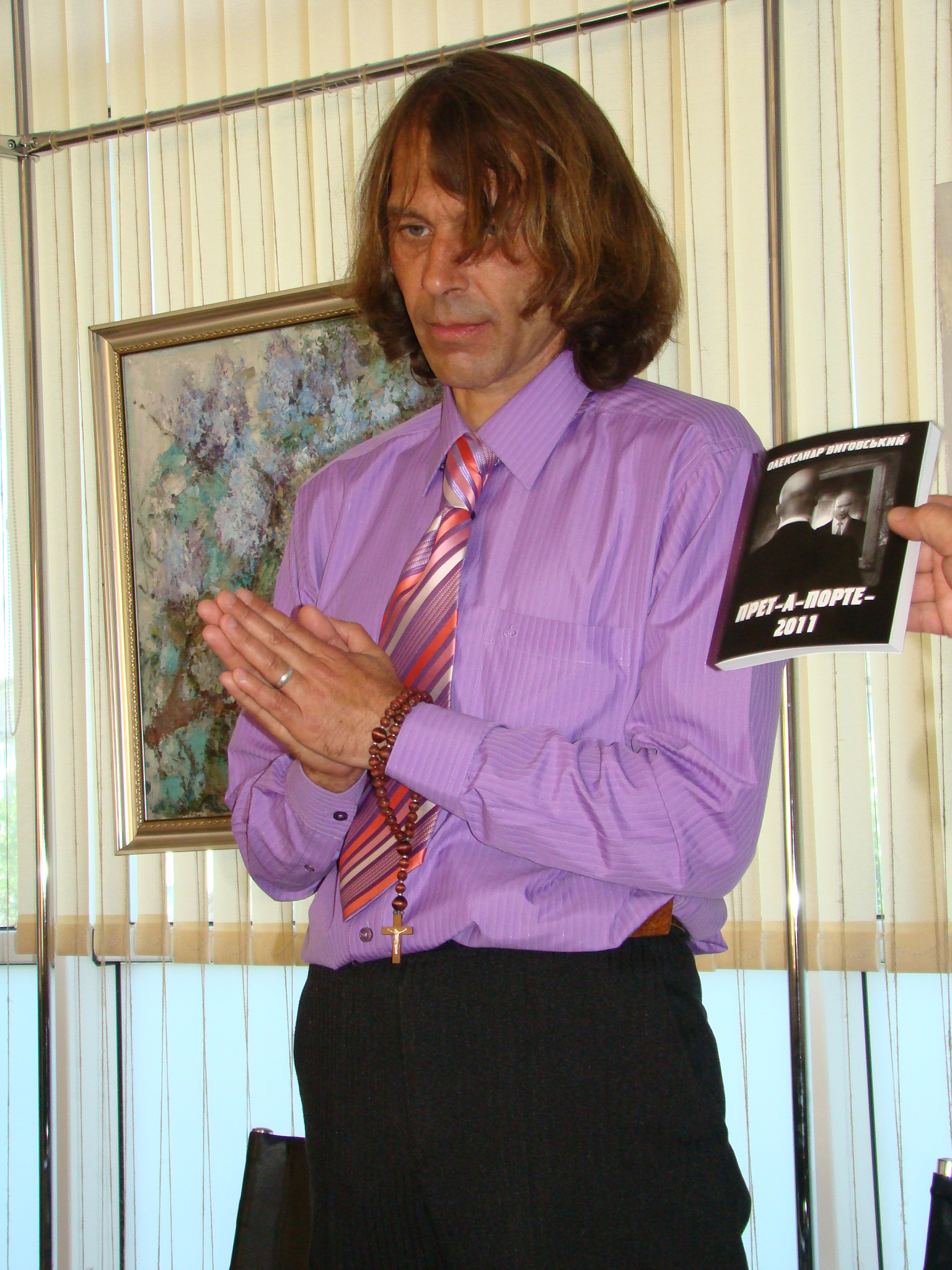 На презентації нової книги. 2011 рік